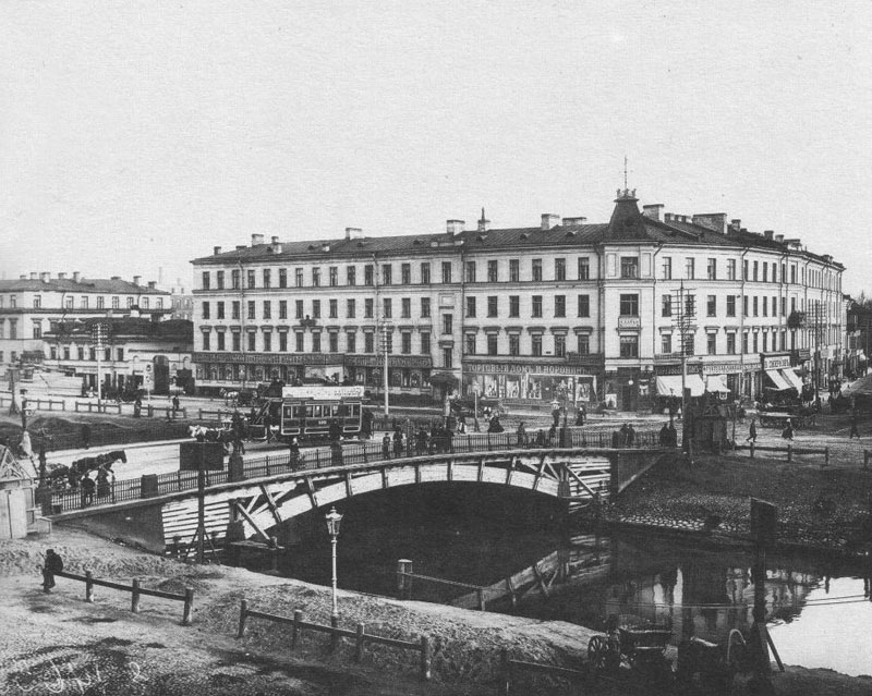 Конка на Ново-Калинкином мосту, Санкт-Петербург